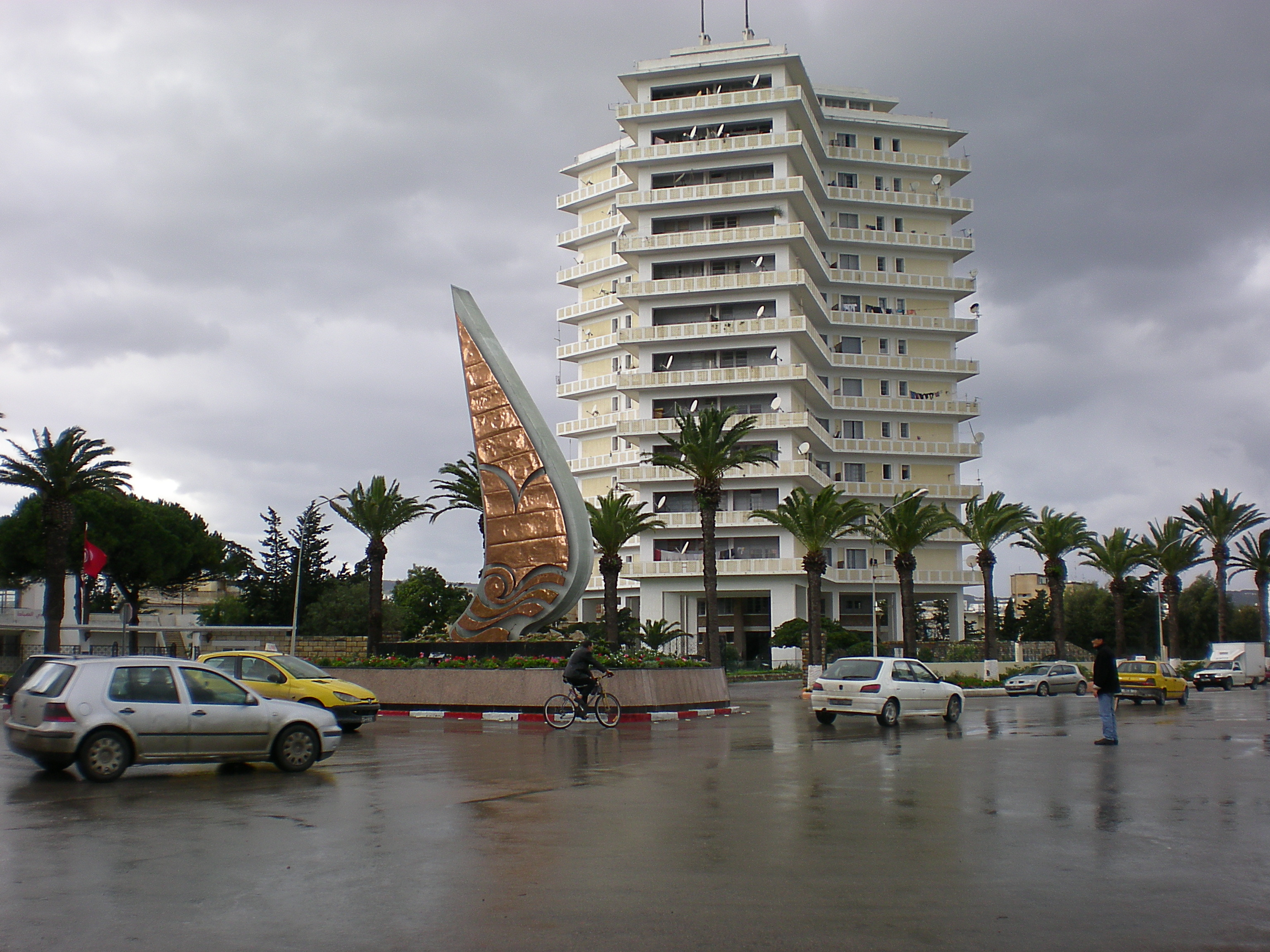 Bizerte center.